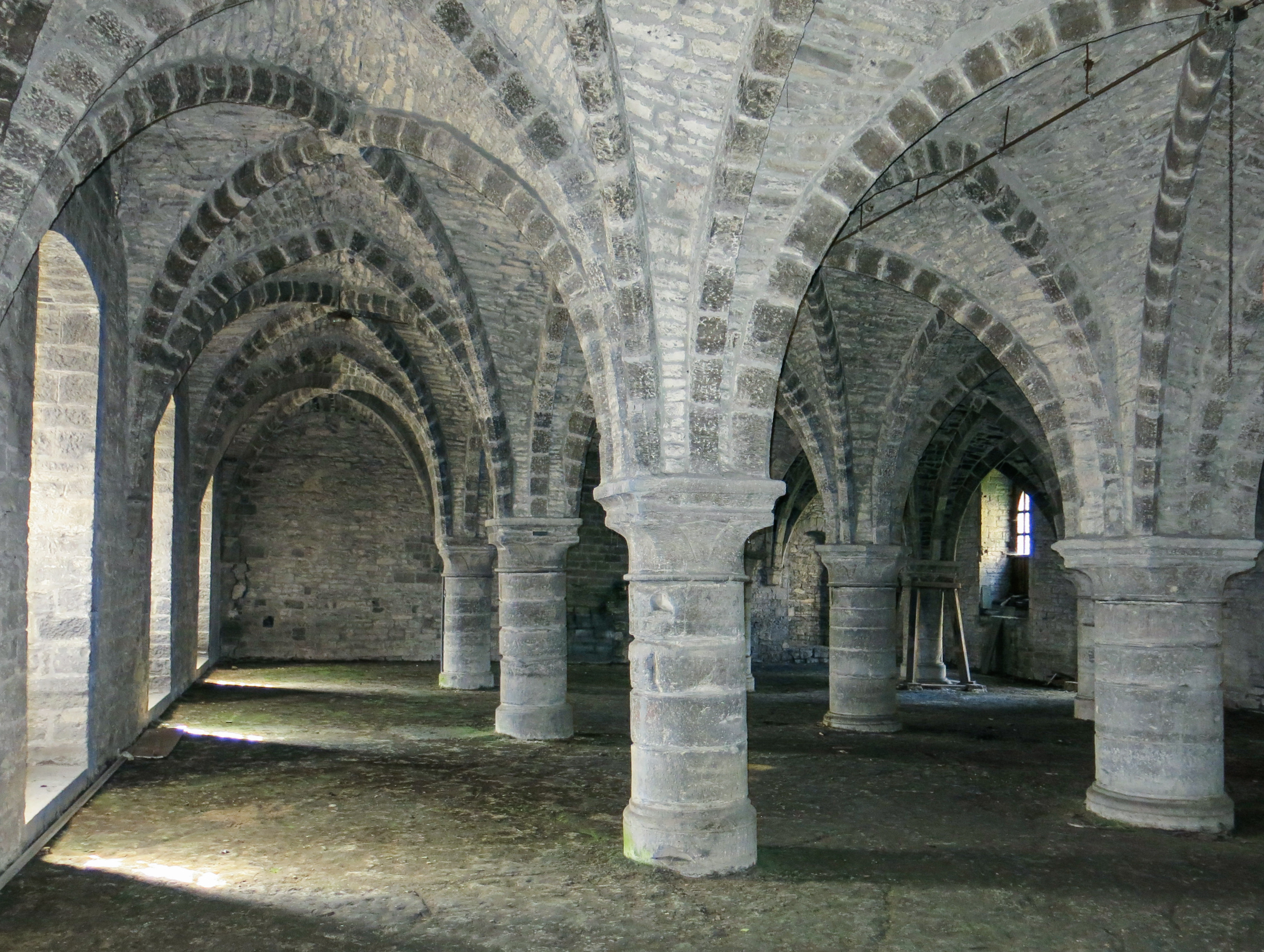 Geraard de Duivelsteen